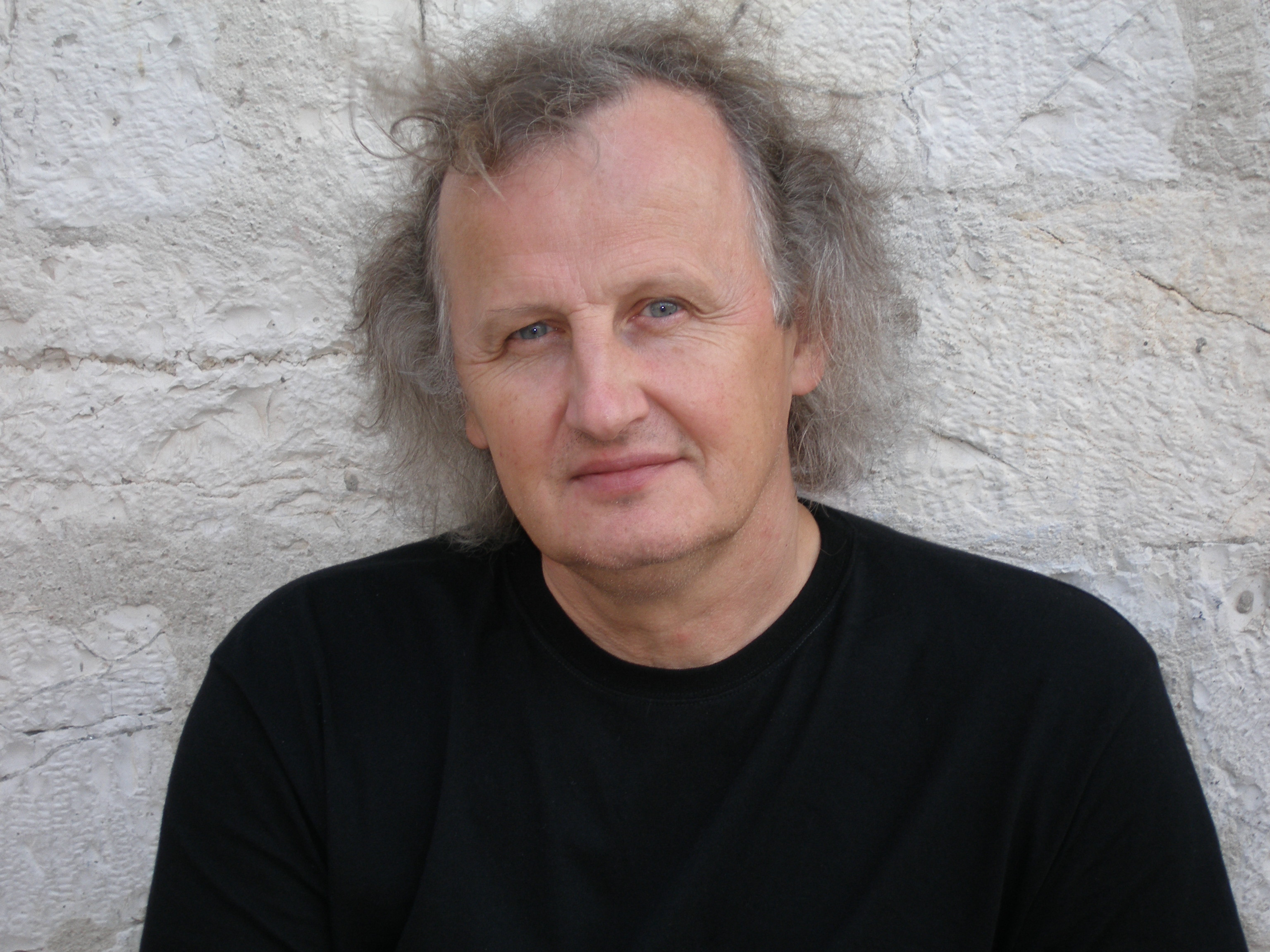 Roman Kalarus, grafik, ASP Katowice